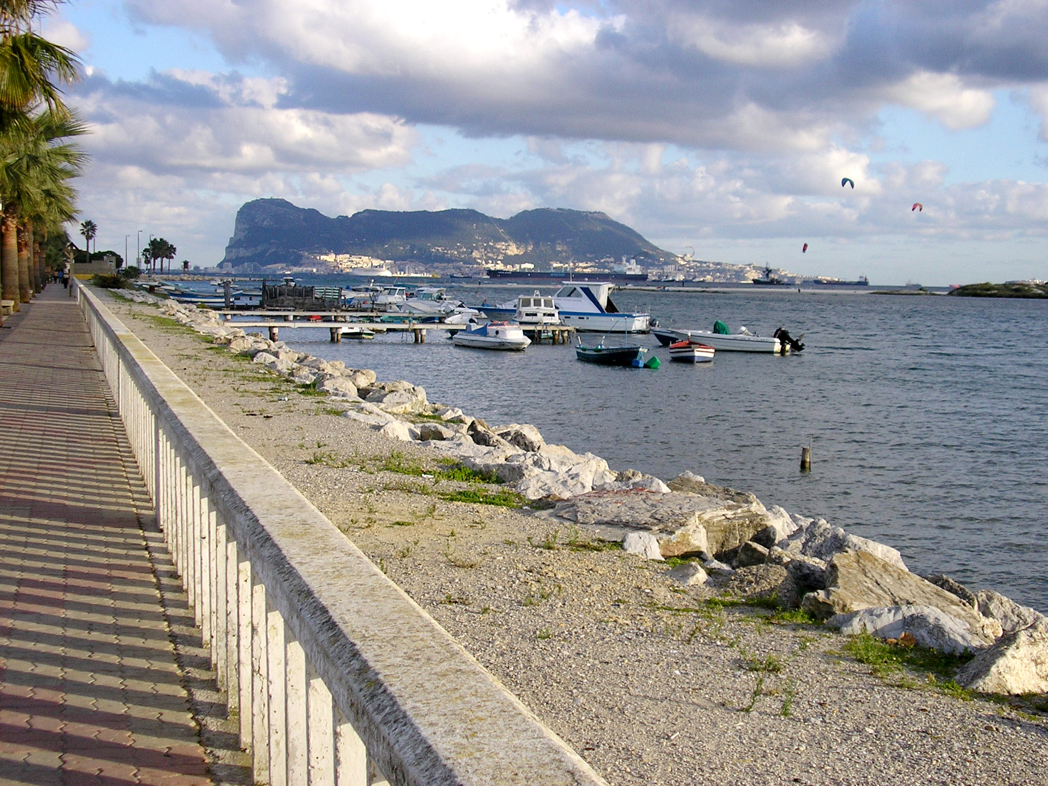 Desembocadura del rio Palmones en la Bahía de Algeciras, Andalucía, España